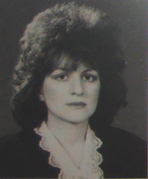 Elnara Kerimova